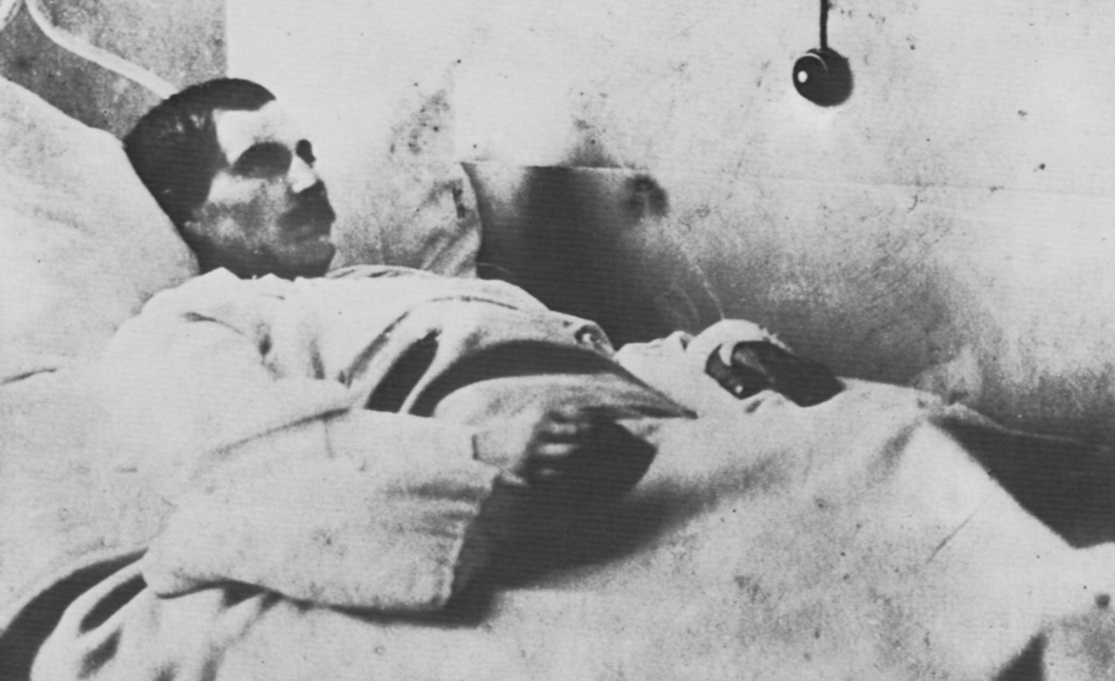 Originale Bildunterschrift: Mathias Kneißl auf dem Krankenbett.